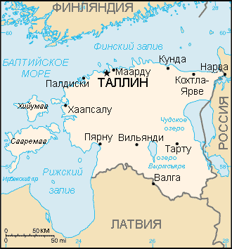 Карта Эстонии